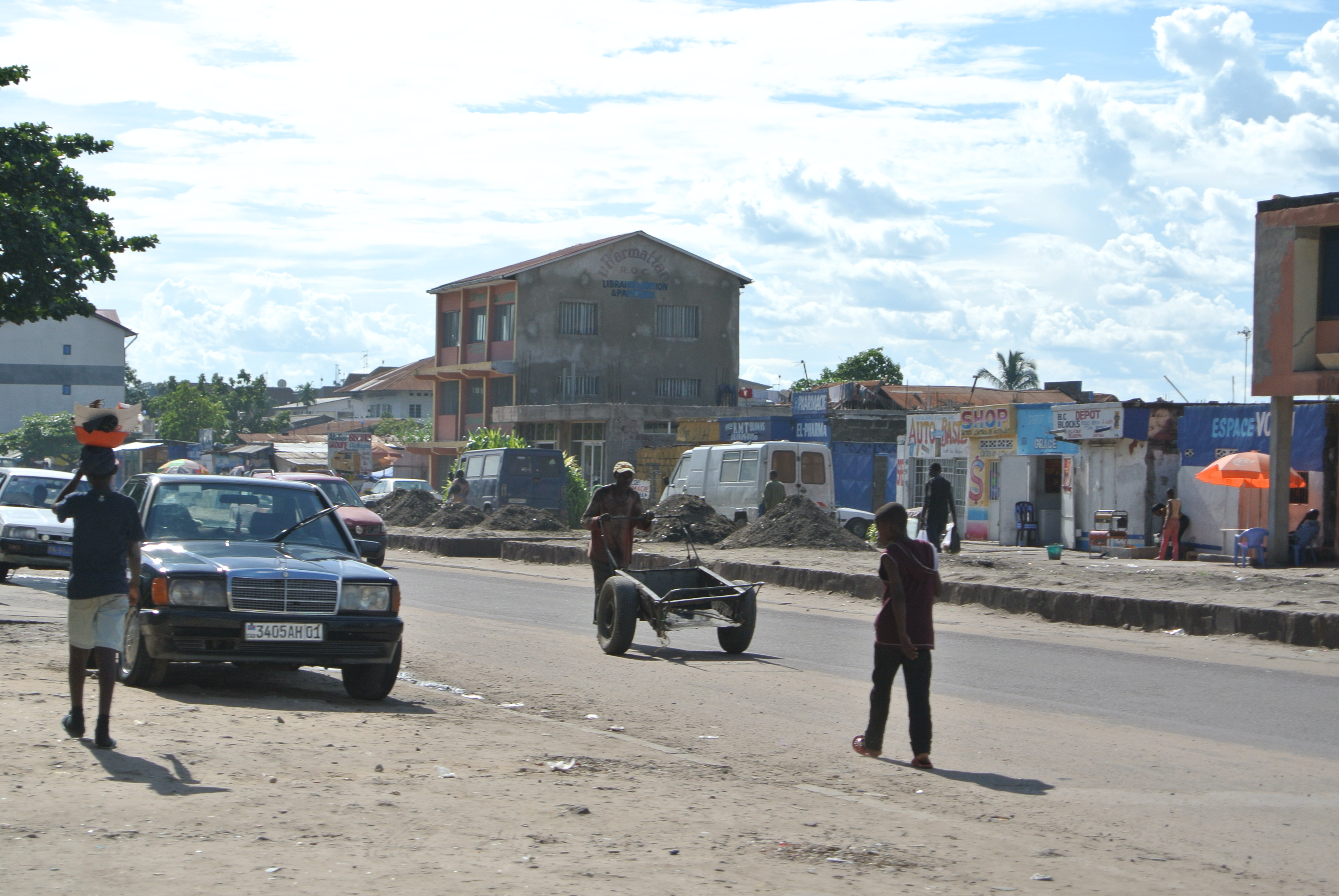 Boulevard des Huilleries, Kinshasa Habitant et bâtiment dans la ville de Kinshasa - République Démocratique du Congo - 2013 (Photo Copyleft - Antoine Moens de hase)